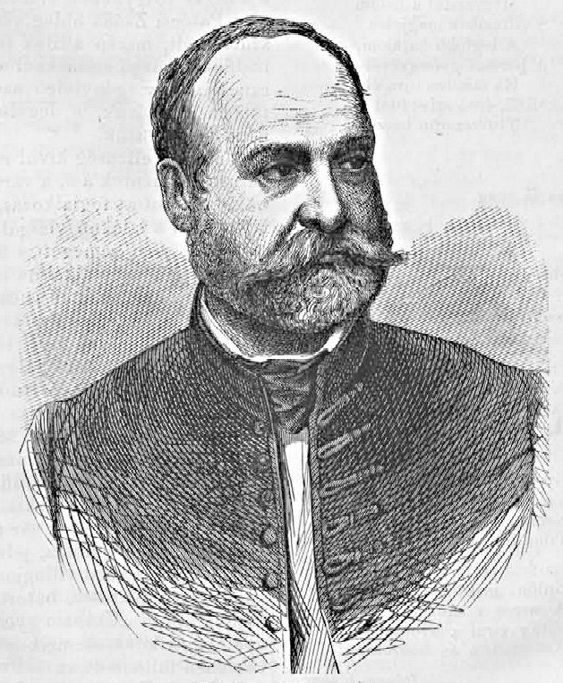 Hunfalvy Pál (1810–1891) nyelvész, etnológus, történetíró (Vasárnapi Ujság, 1862. szeptember 21.)